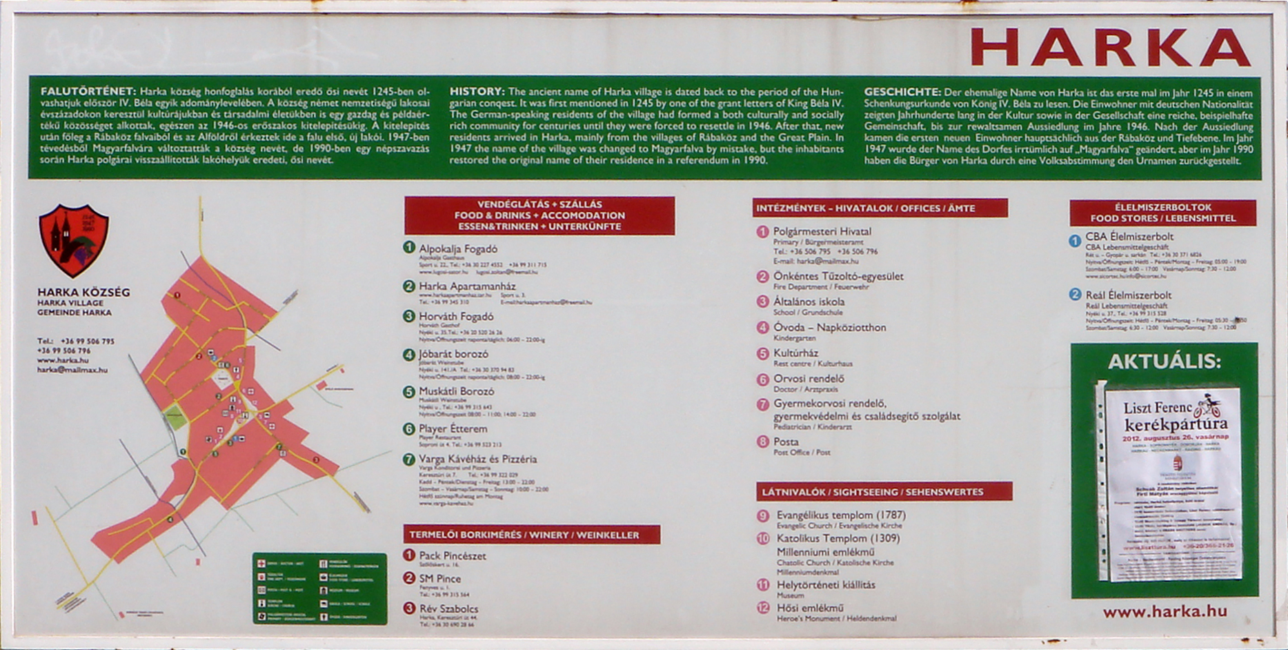 Gemeinde-Werbetafel HU-Harka (Harkau) an der Grenze zu AT-Neckenmarkt